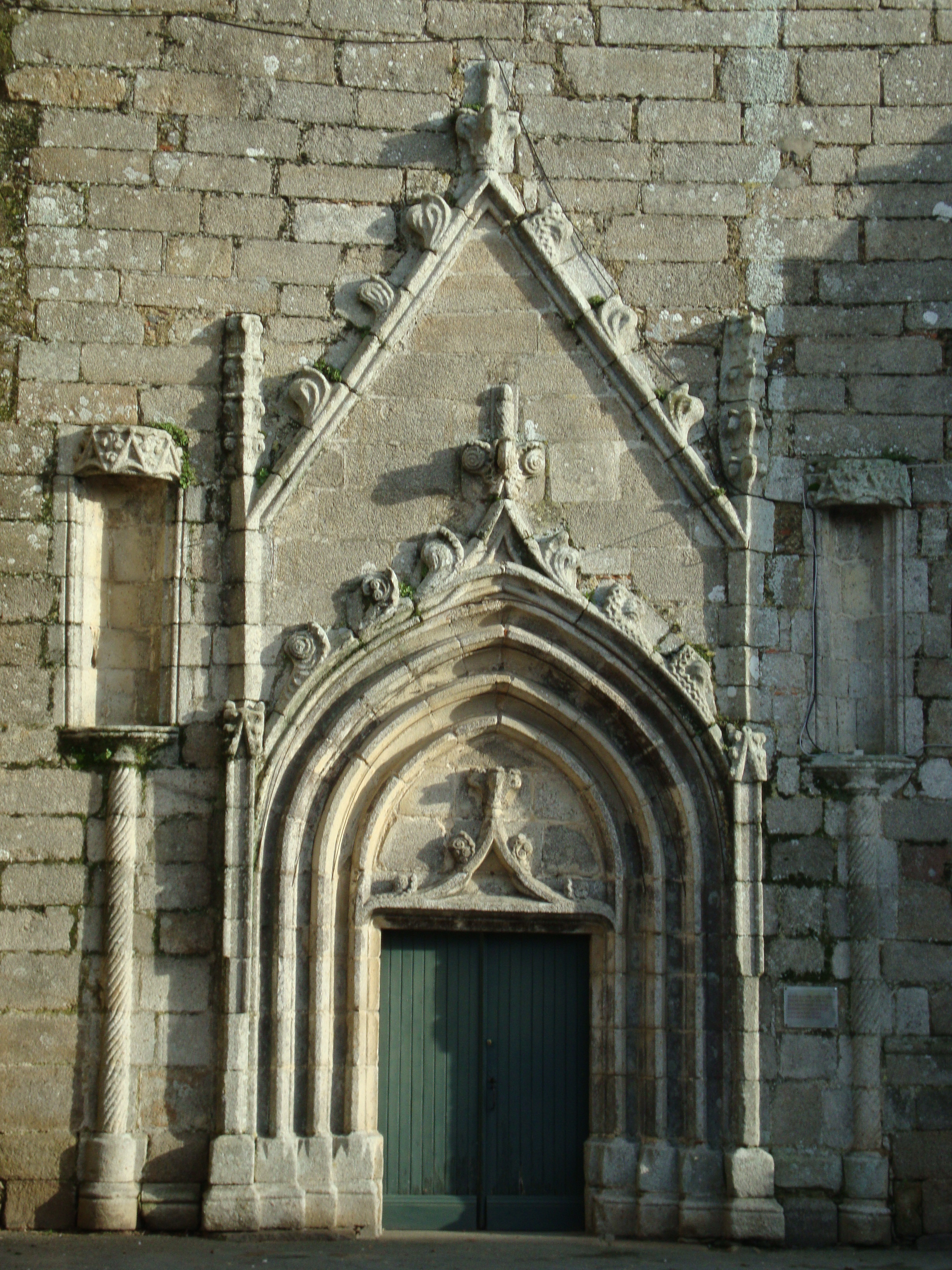 Église Notre-Dame de Montournais, (Inscrit, 1993) .